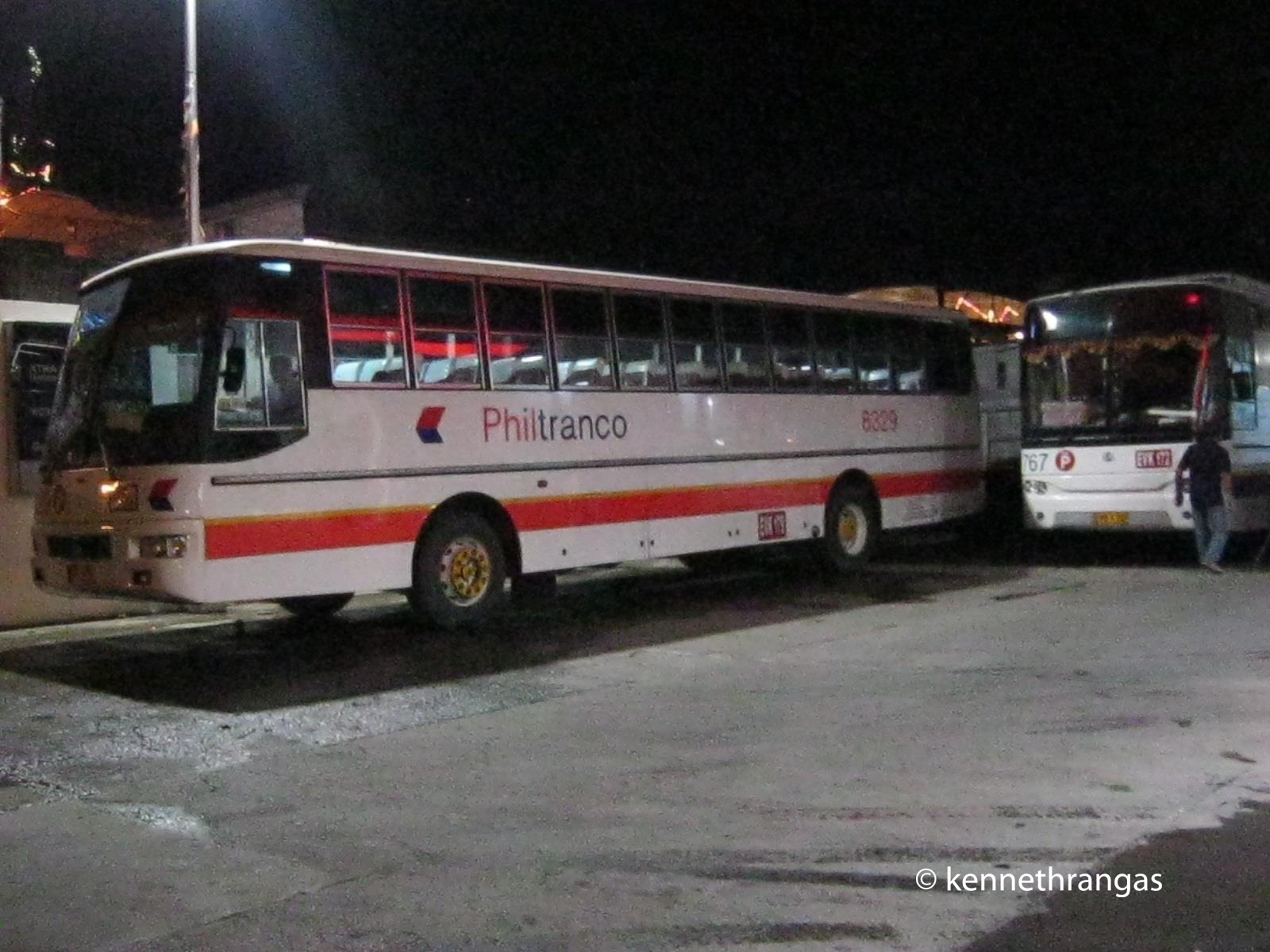 Philtranco Davao